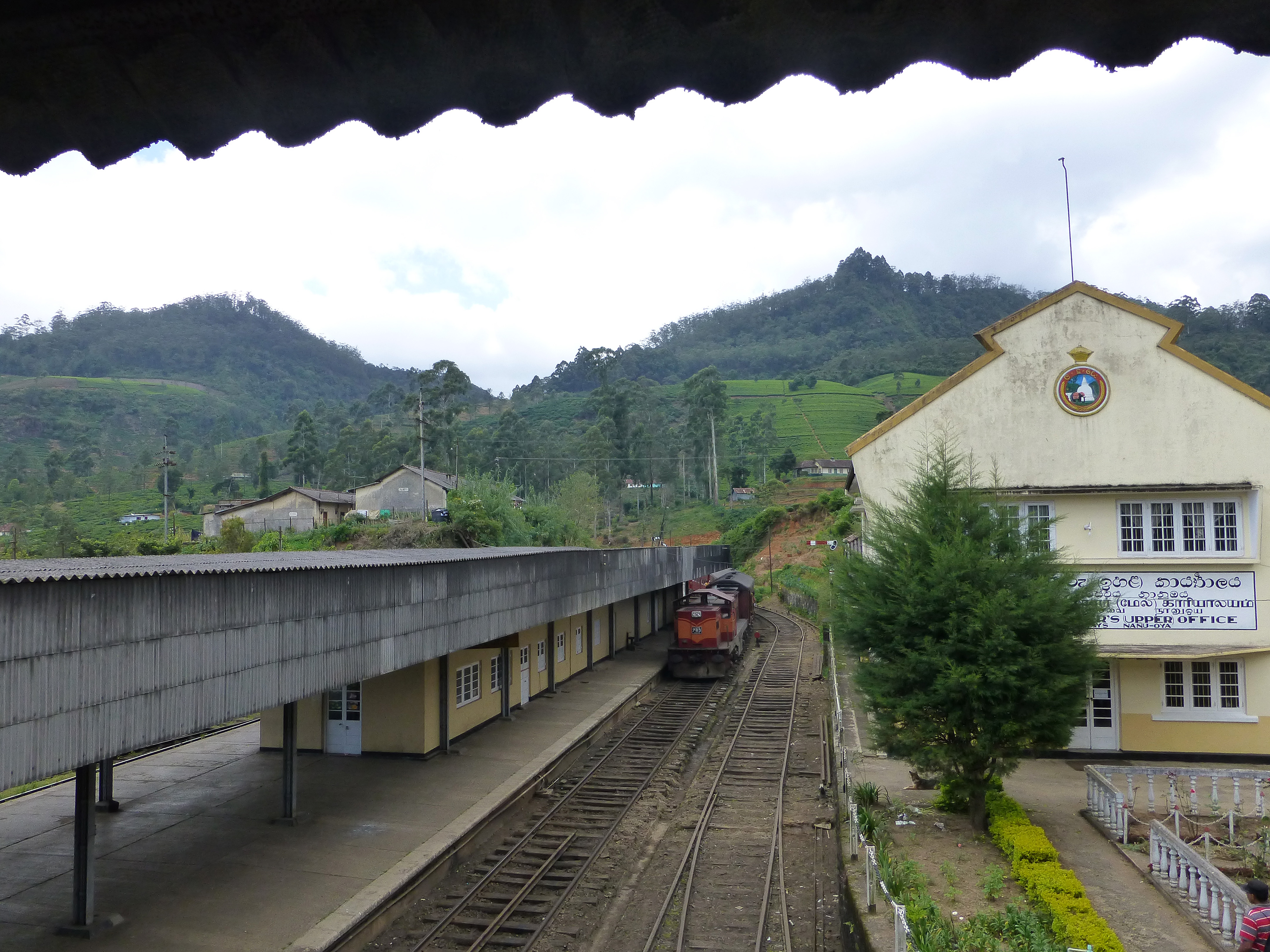 Gare de Nanu Oya (Sri Lanka)